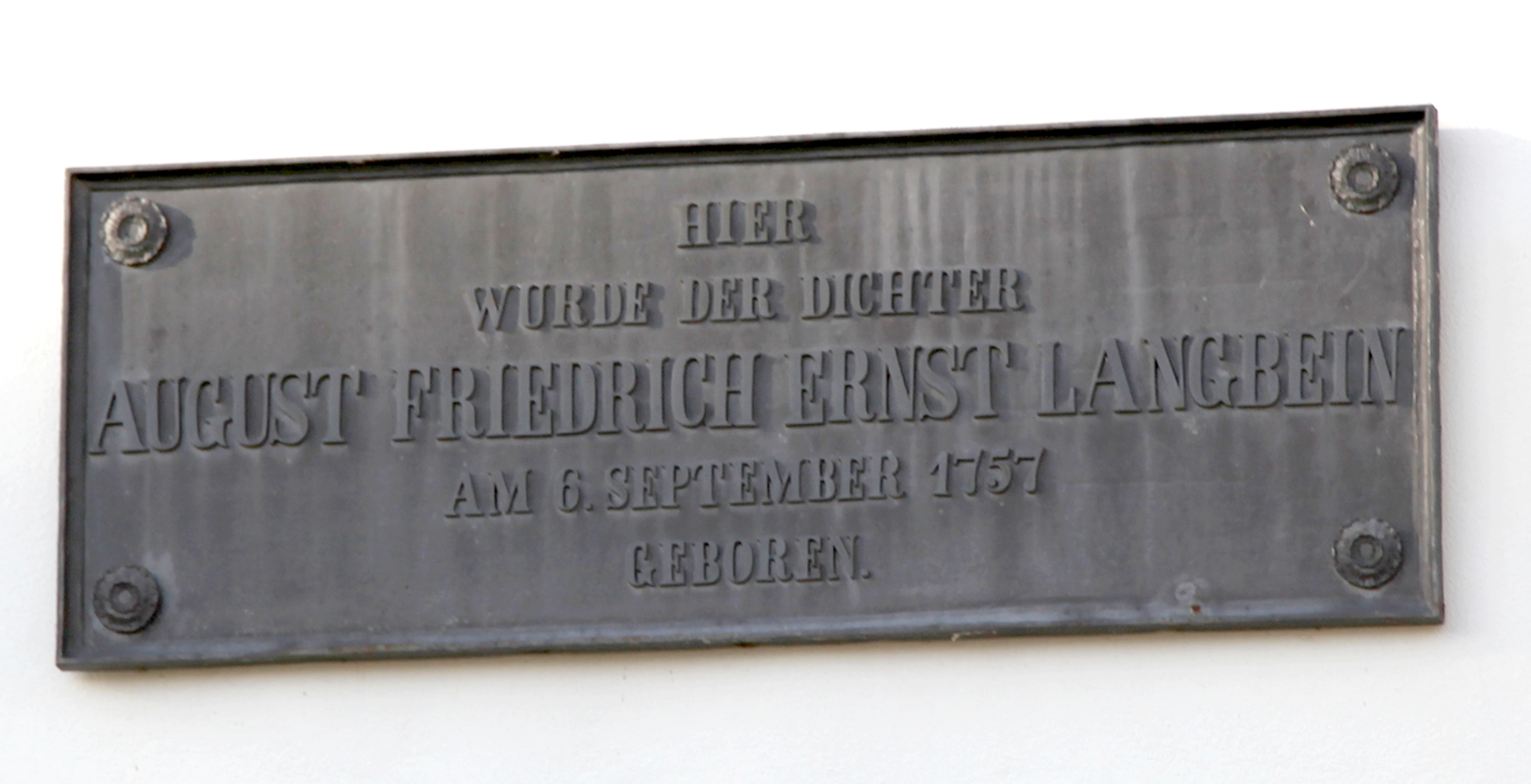 Gedenktafel für August Friedrich Ernst Langbein am Schloss Klippenstein, der 1757 dort geboren wurde